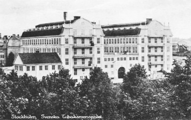 Svenska Tobaksmonopolets nybyggda fabrik i Stockholm sedd mot Maria Bangata.